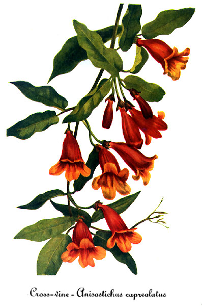 Watercolor painting of Bignonia_capreolata.